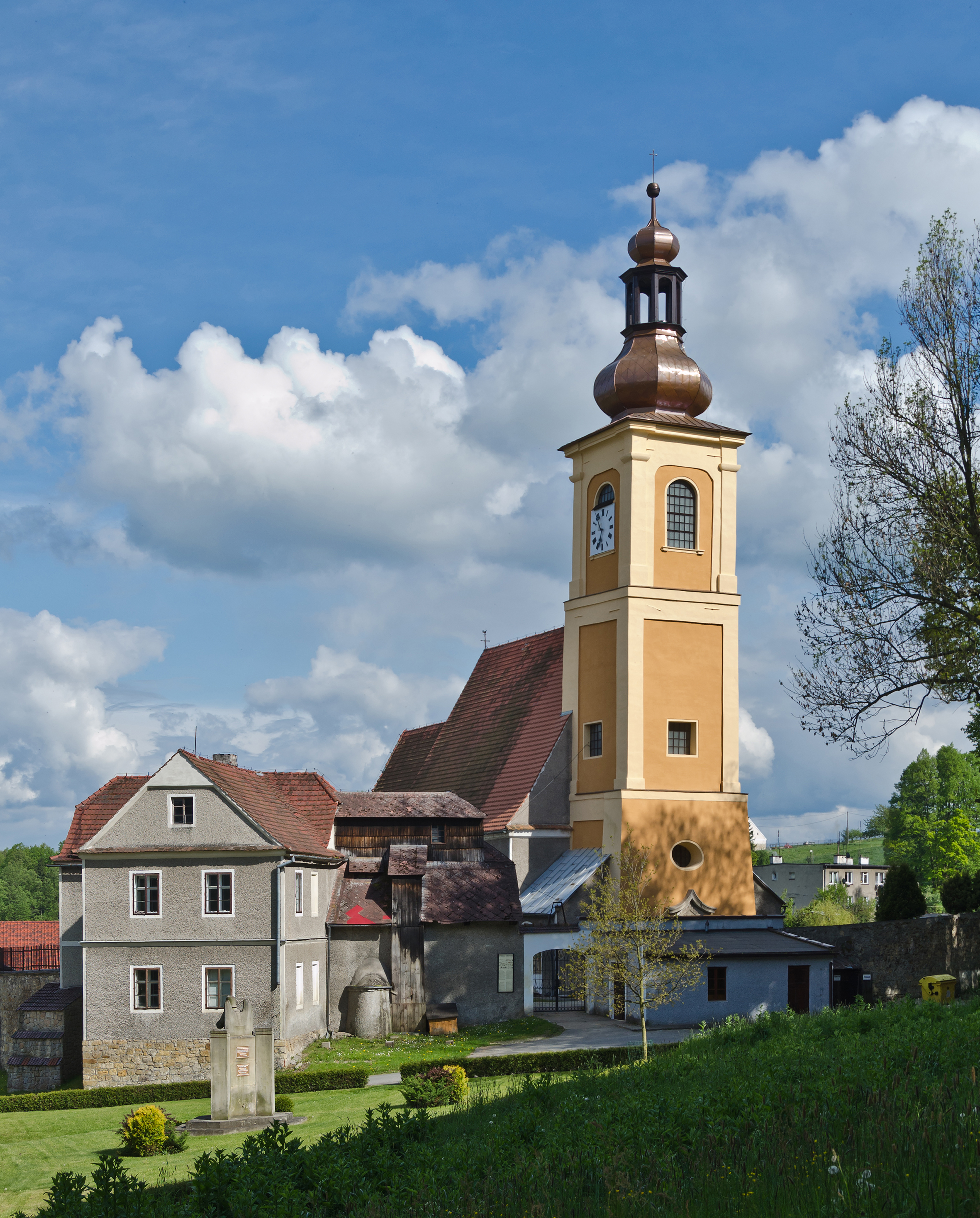 Szalejów Dolny, kościół par. p.w. śś. Szymona i Tadeusza, 1489, poł. XVIII